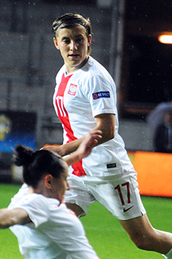 Katarzyna Daleszczyk